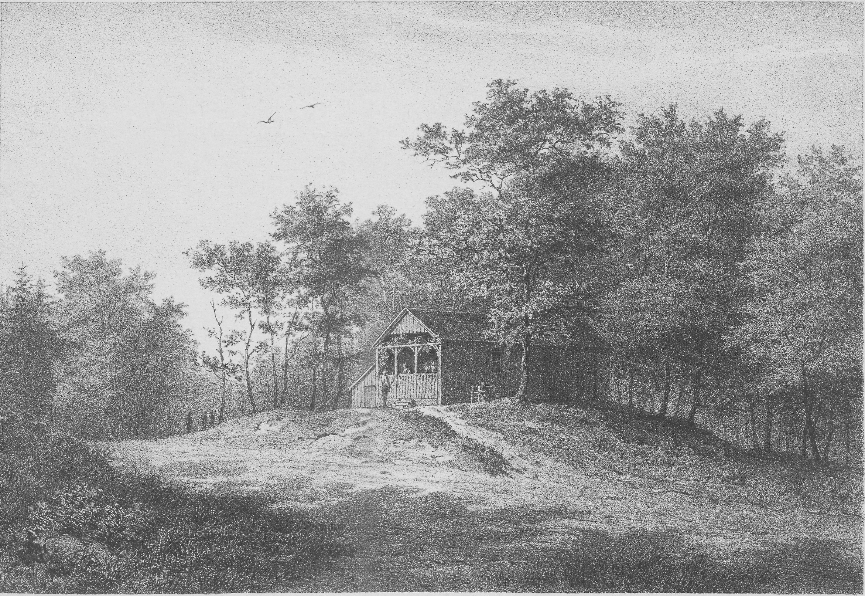 Ernst von Bandels Wohnung am Hermannsdenkmal